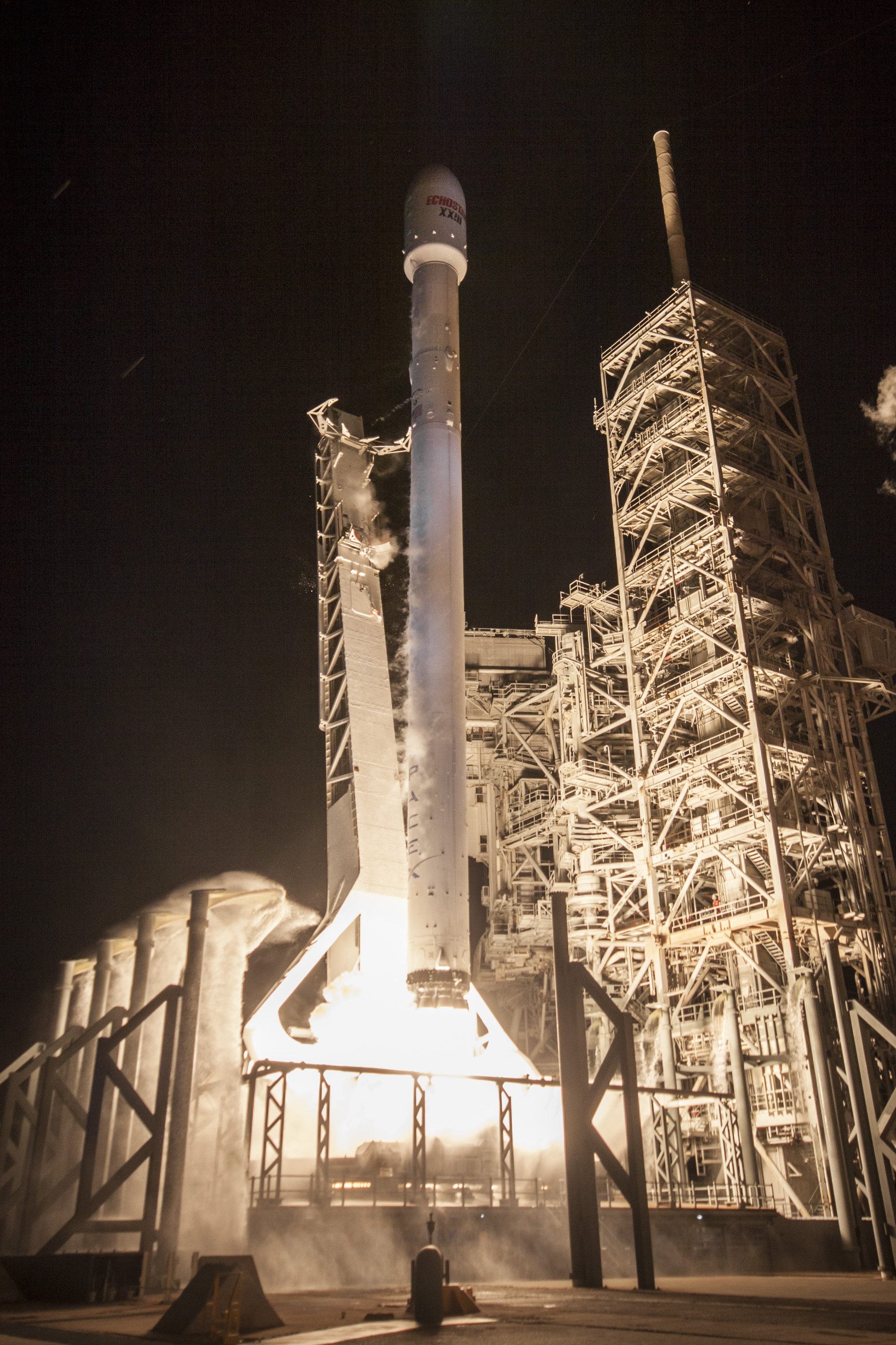 EchoStar XXIII Launch